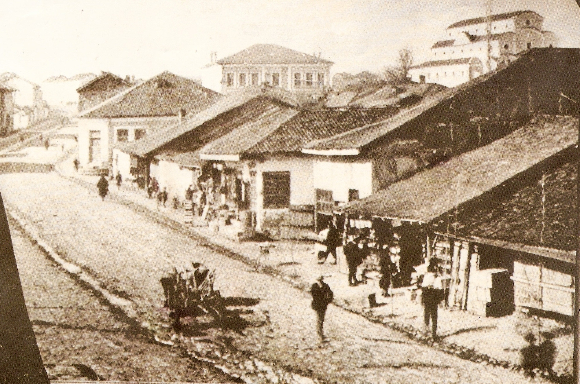 Gjilani dikure 1925